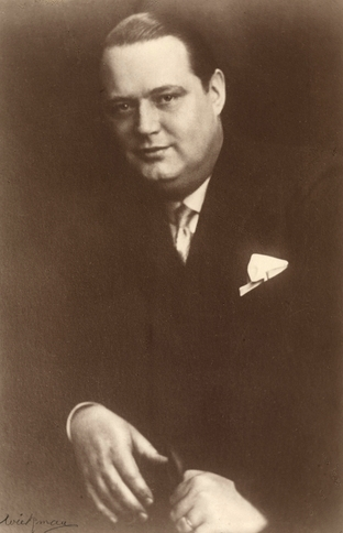 portrett, mann, operasanger, halvfigur.